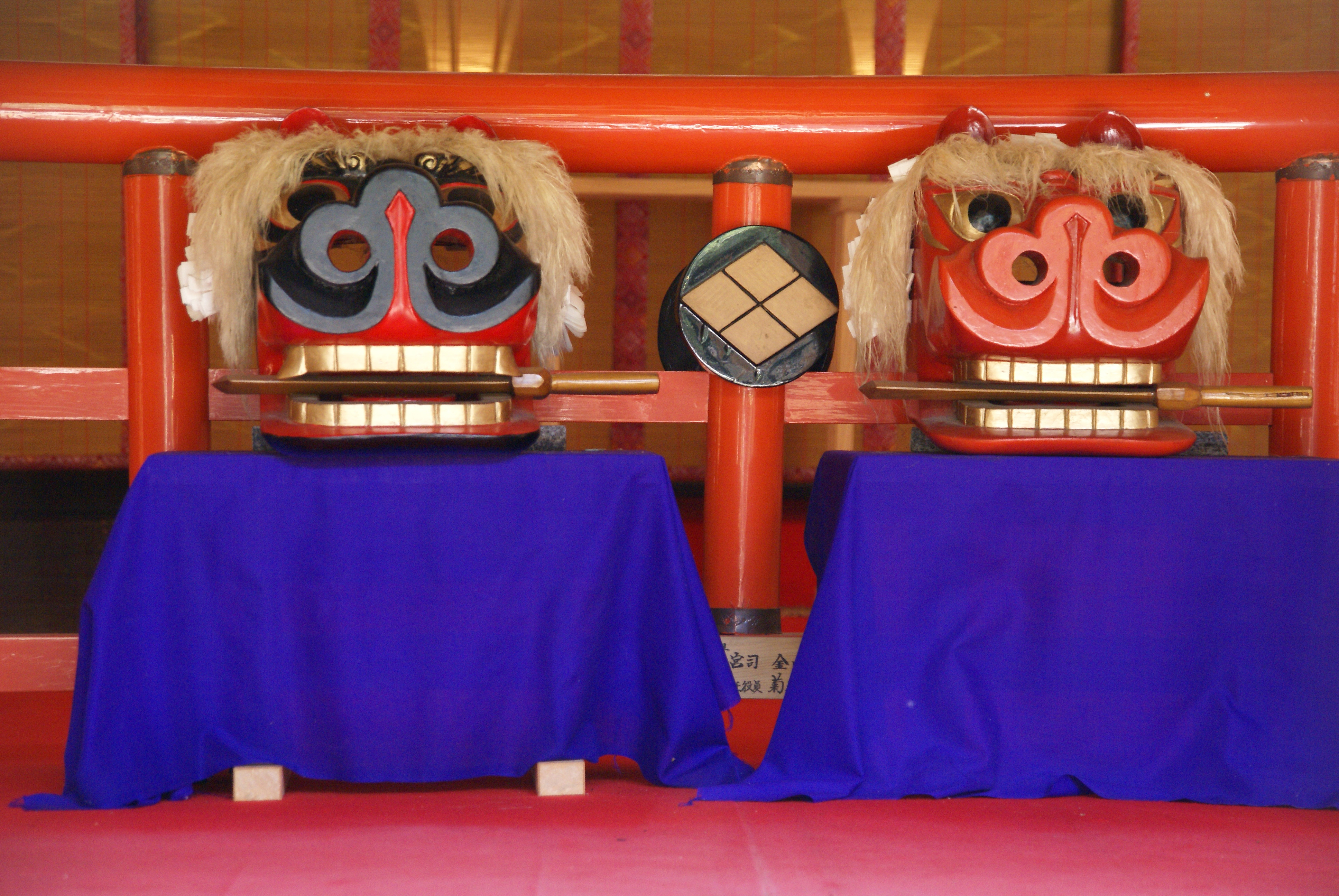 Nanbu-jinja in Tono, Iwate prefecture, Japan